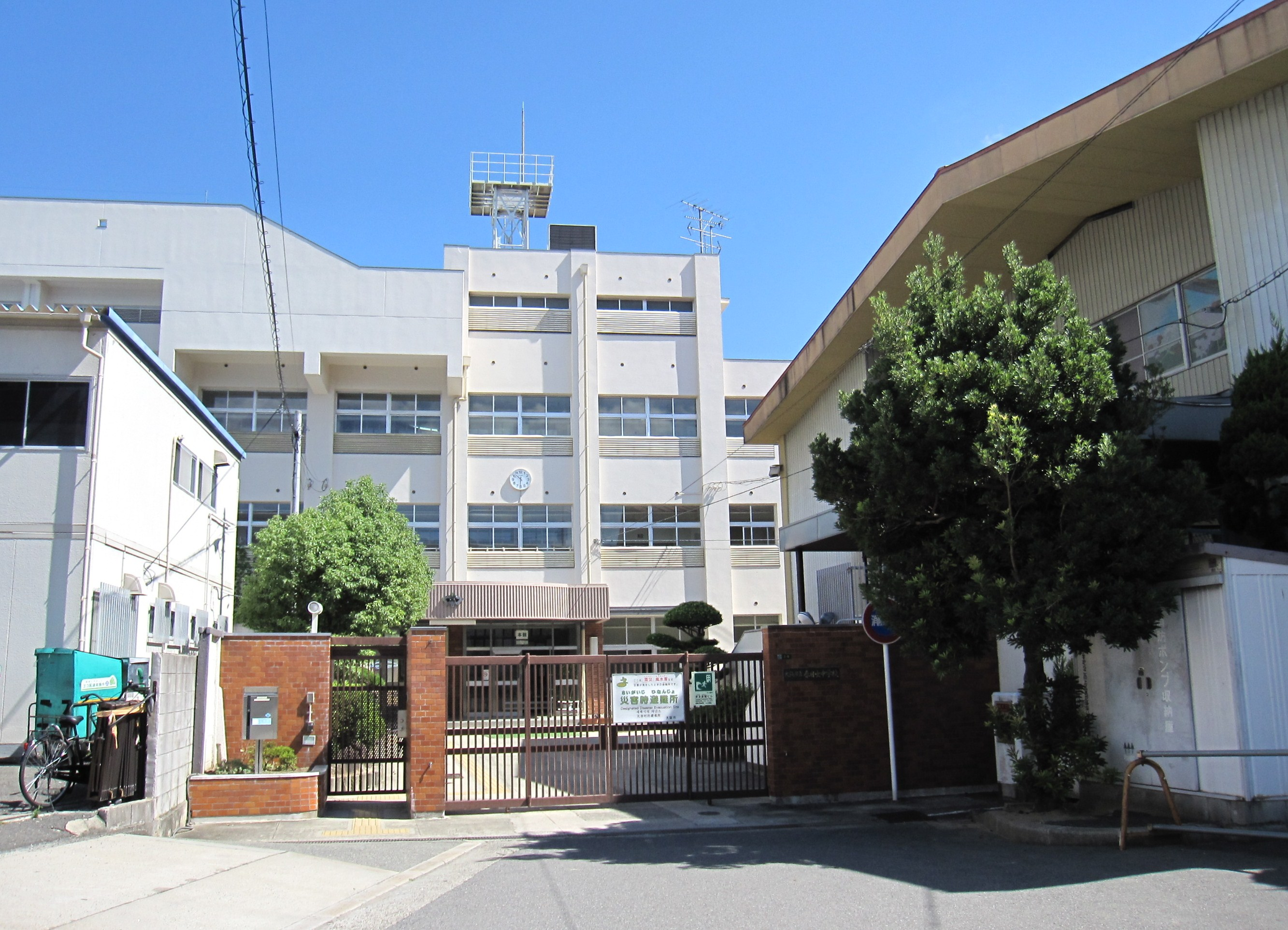 大阪市立春日出中学校